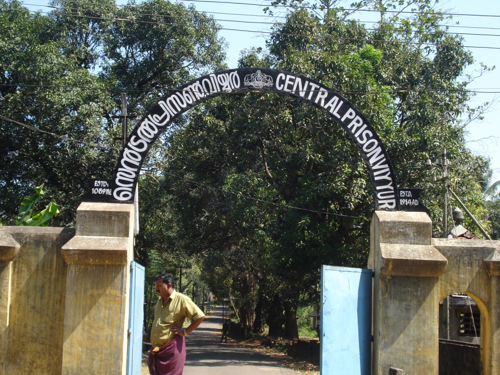 Central jail, Viyyur